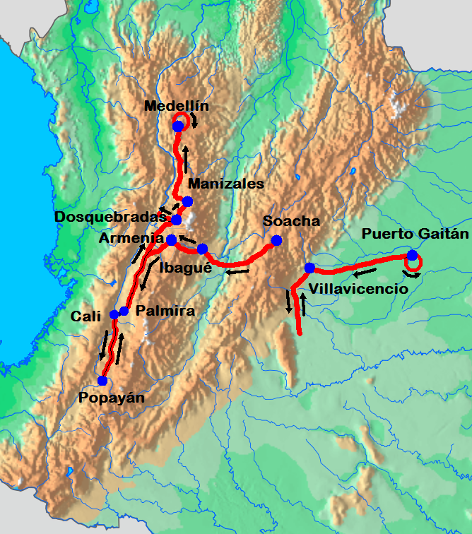 Recorrido de la Vuelta Ciclista a Colombia 2012